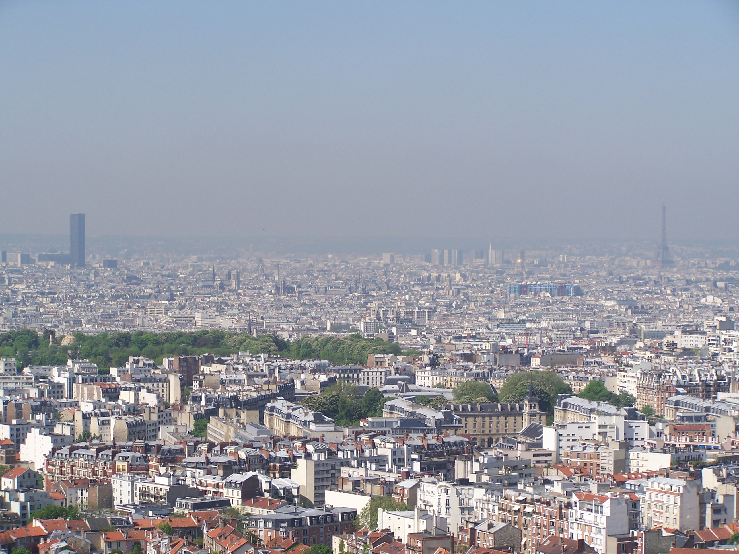 Tour Eiffel et Tour Montparnasse depuis l'une des tours Mercuriales de Bagnolet.